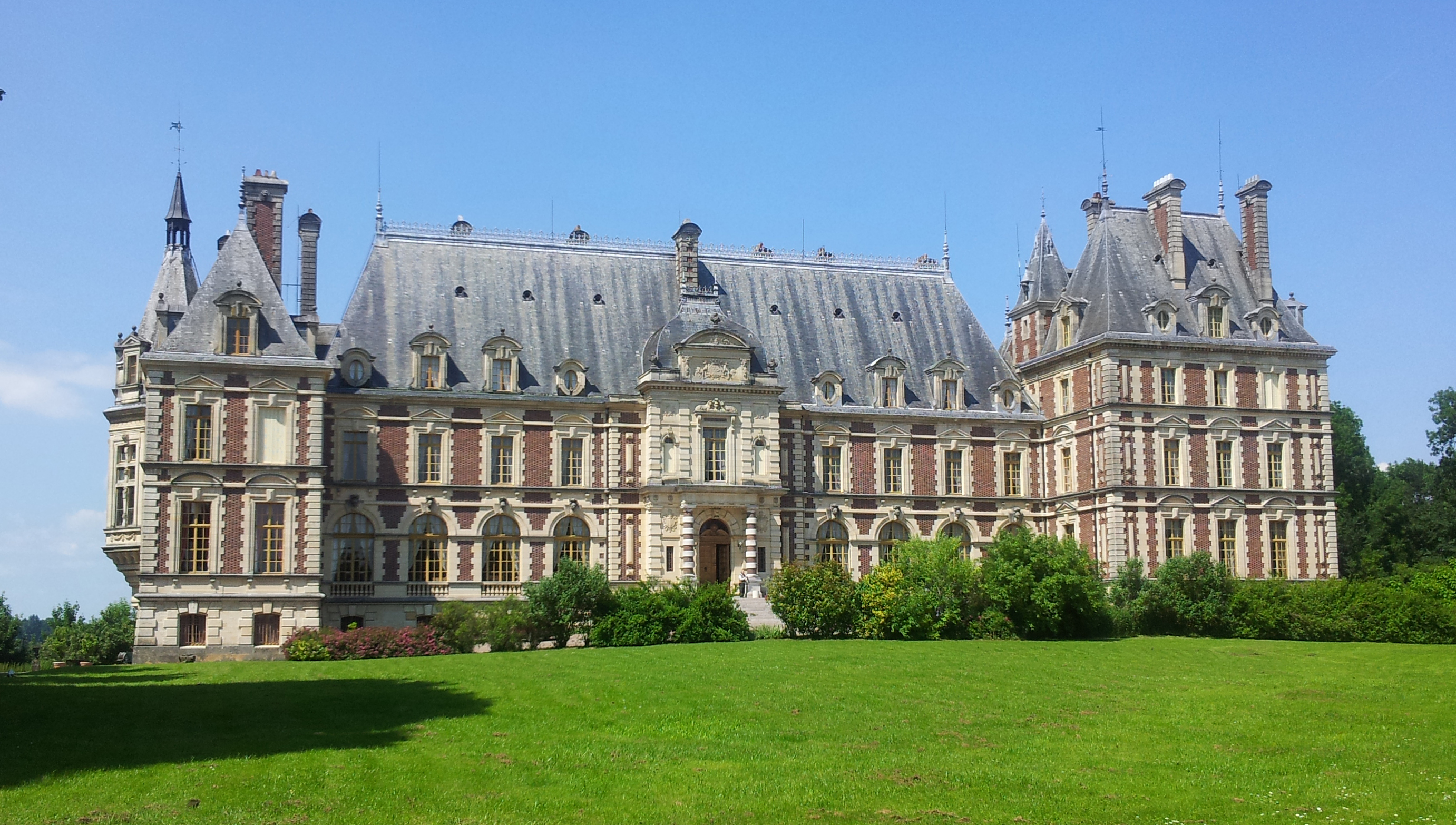 Château de Villersexel.